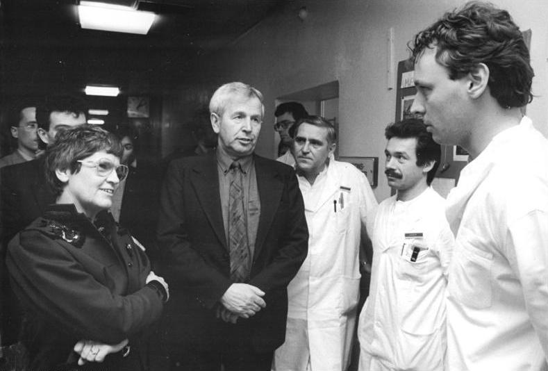 Berlin, Besuch eines Krankenhauses, Rita Süssmuth ADN-ZB Settnik 22.2.90 Berlin: Süssmuth-Besuch Im Rahmen ihres DDR-Aufenthaltes besuchte Bundestagspräsidentin Rita Süssmuth (l) das Krankenhaus Friedrichshain. In ihrer Begleitung befanden sich Oswald Wutzke (2.v.l.), Generalsekretär des Demokratischen Aufbruch und der Student Eike Langhein (r) aus Osnabrück, der gegenwärtig ein Praktikum in der Einrichtung absolviert. Abgebildete Personen: Süssmuth, Rita Dr.: Präsidentin des Bundestages, CDU, Bundesrepublik Deutschland Wutzke, Oswald: 1990 Generalsekretär des Demokratischen Aufbruchs (DA), DDR